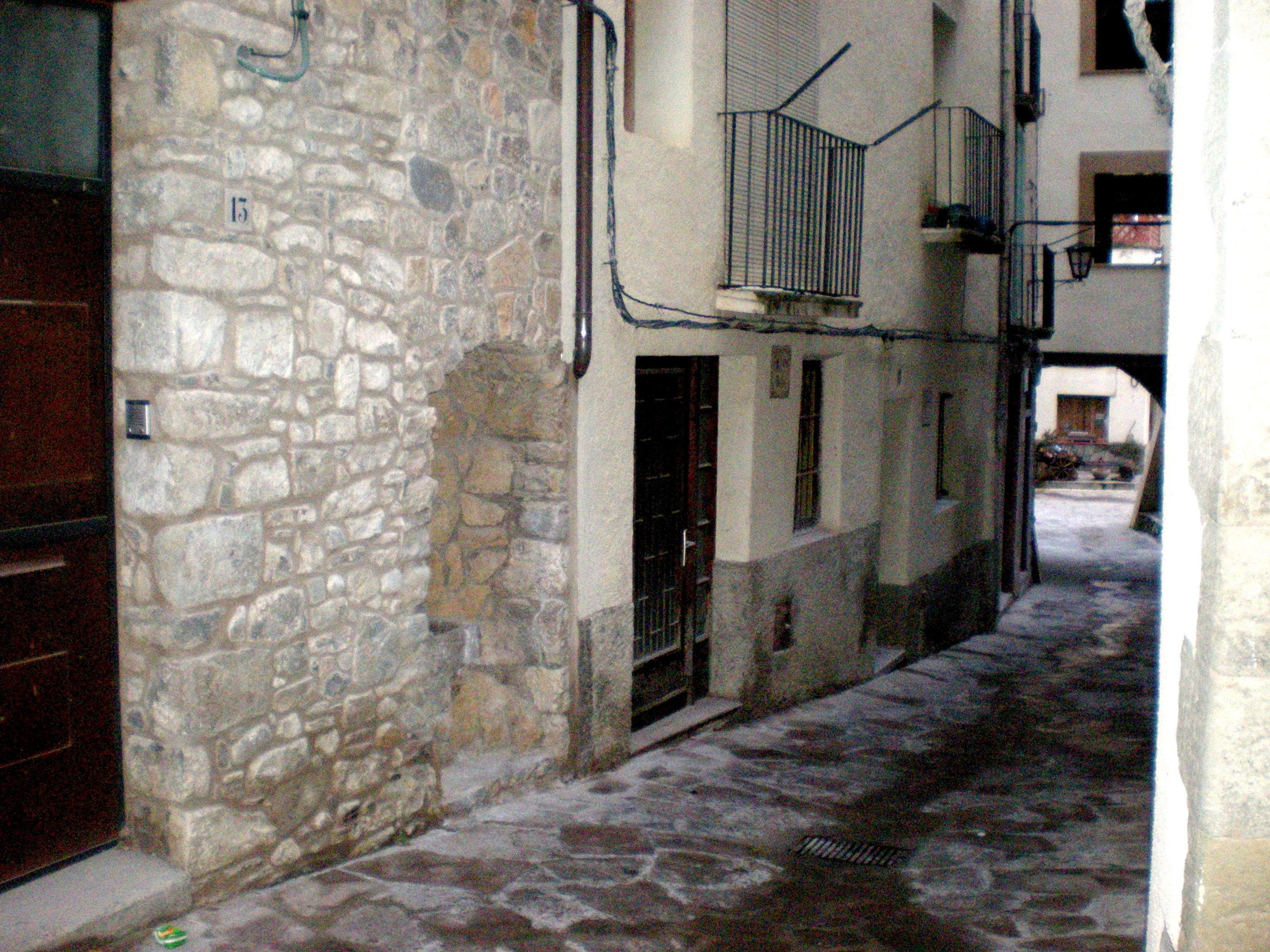 La font de la Vila, a Sant Llorenç de Morunys (Solsonès)